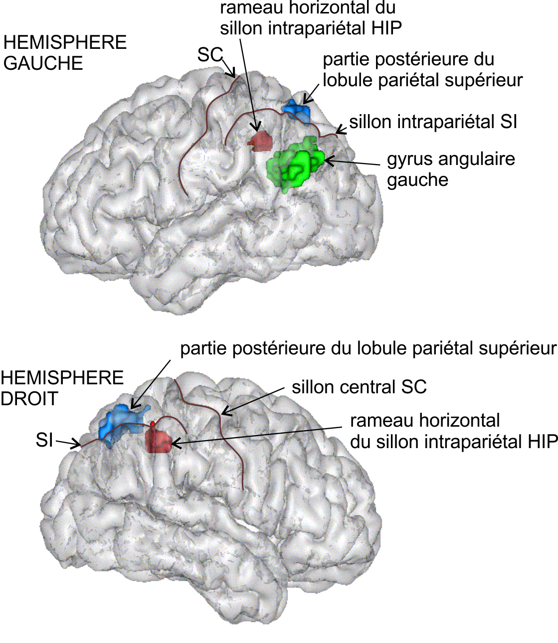 Représentation 3D des régions pariétales activées dans les taches numériques, d'après Anna J. Wilson, Stanislas Dehaene, Number Sense and Developmental Dyscalculia dans "Human Behavior, Learning, and Developing Brain: Atypical Development" par Coch, Dawson, Fischer, Guilford Press, 2010